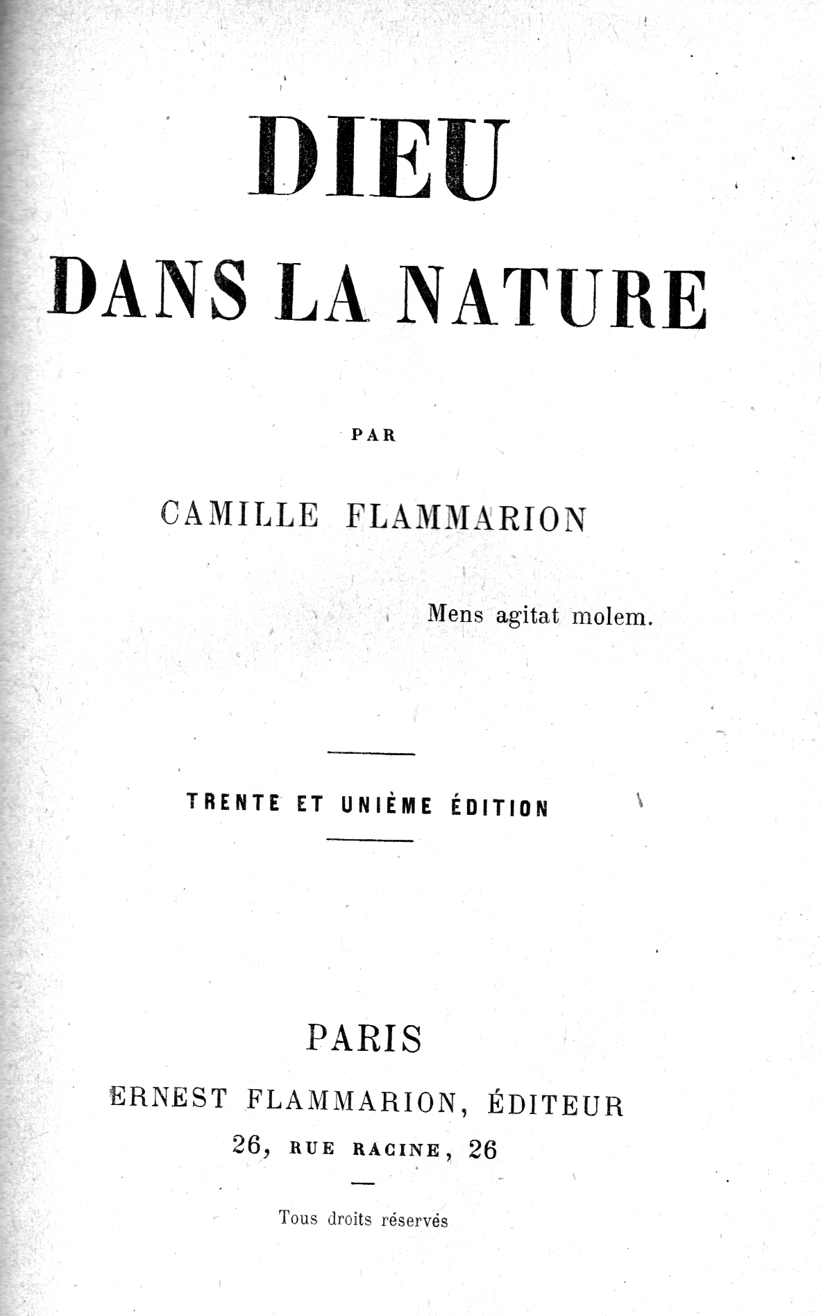 Page de garde d'un ouvrage de Camille Flammarion. Vers 1900.